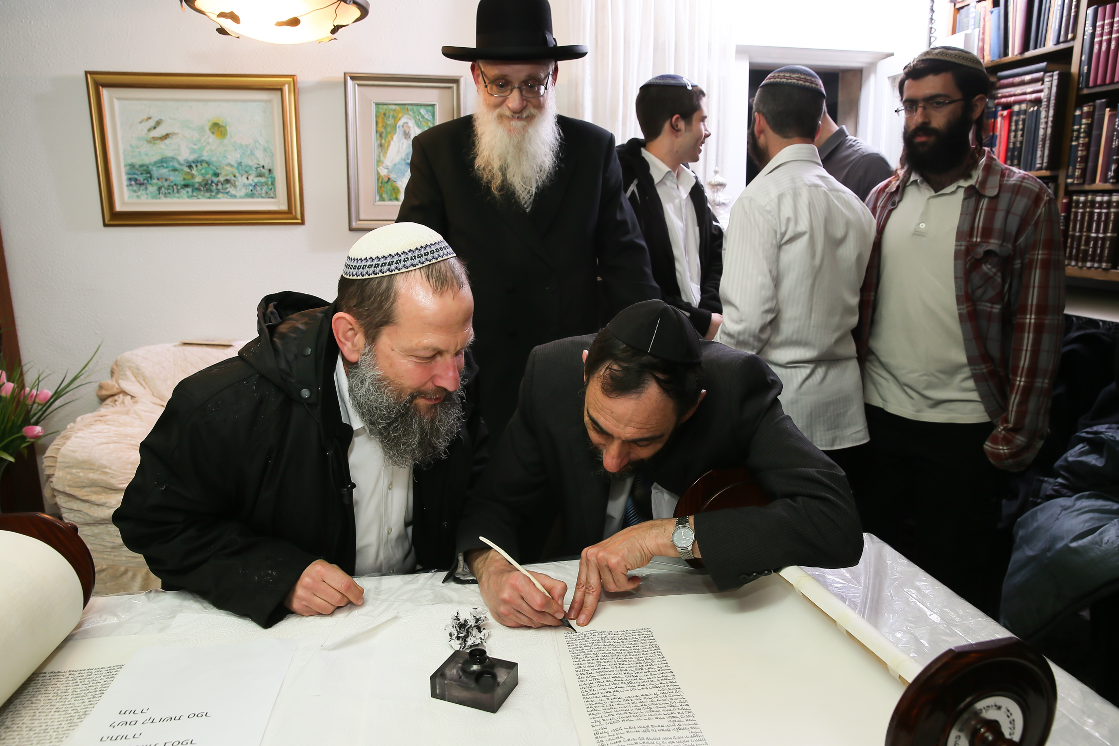 ישיבת מרכז הרב. הרב חיים גנץ בהכנסת ספר תורה בישיבת מרכז הרב עומד מאחור הרב יהושע מגנס.